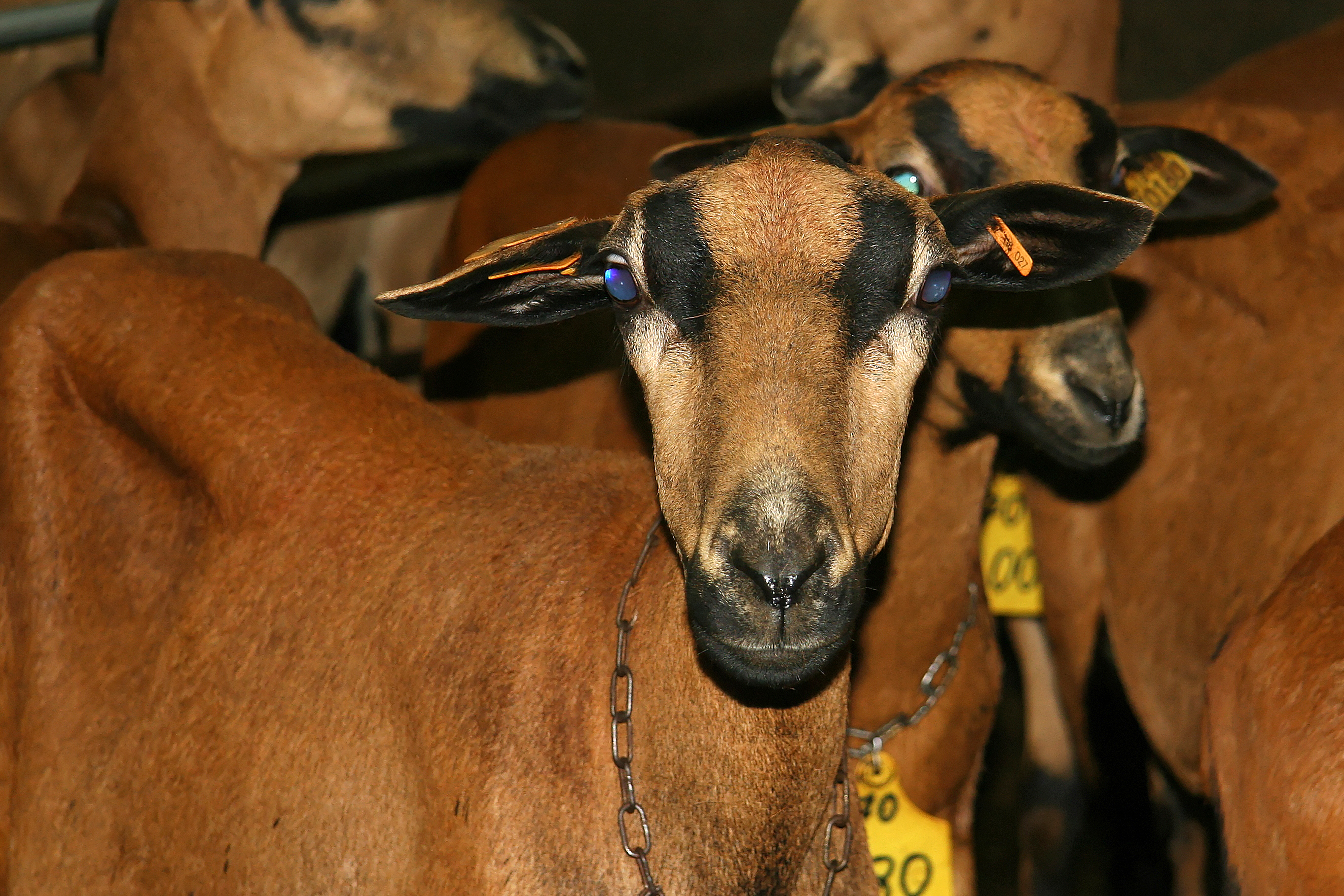 Brebis Martinikn station INRA de la Martinique